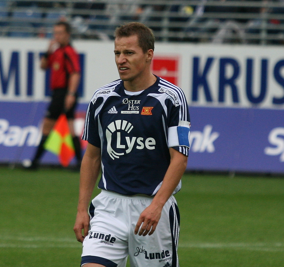 Nikolai Stokholm